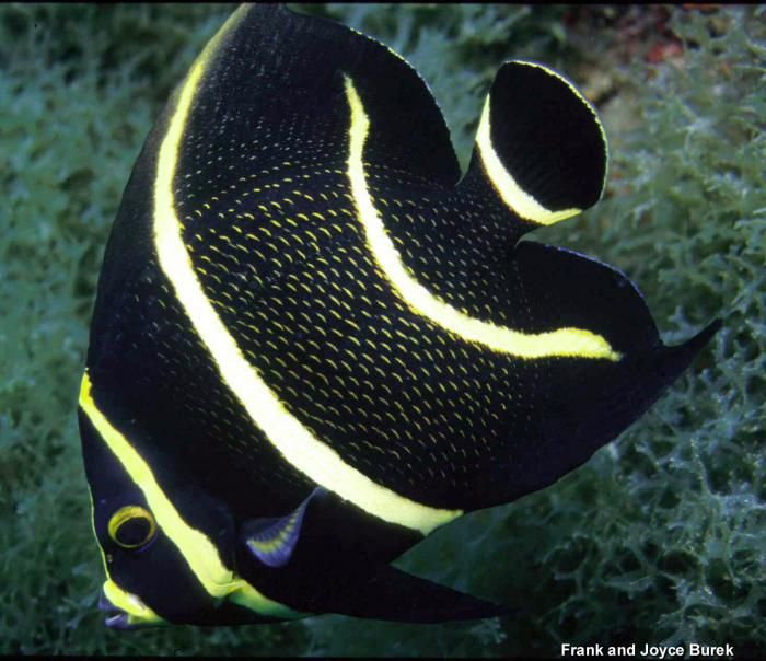 Pomacanthus paru juvenil en Flower Garden Banks, EE.UU.